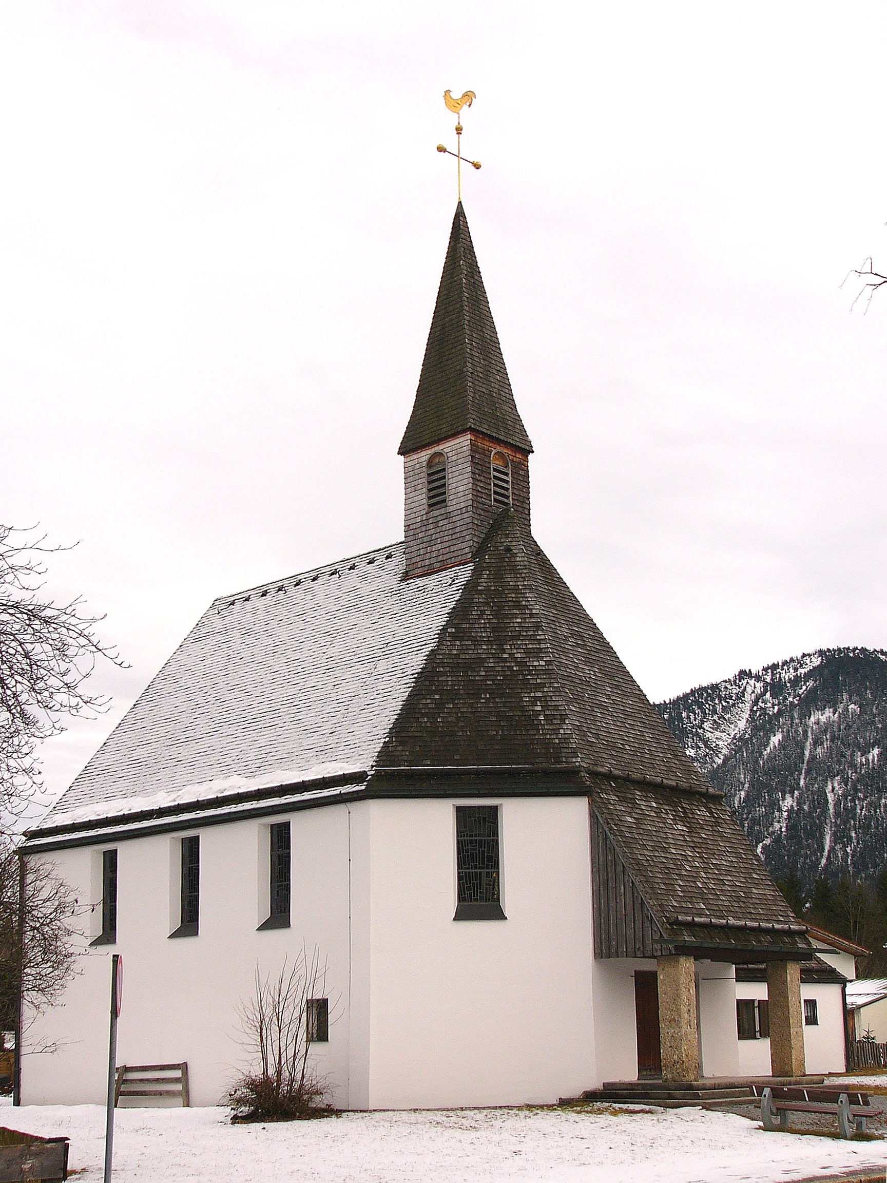 Kath. Kirche Maria Königin; nachkriegsmoderner Saalbau mit scharschindelgedecktem Walmdach und Spitzhelm-Dachreiter, von Paul Kranendick, 1958; mit historischer Ausstattung.This is a photograph of an architectural monument.